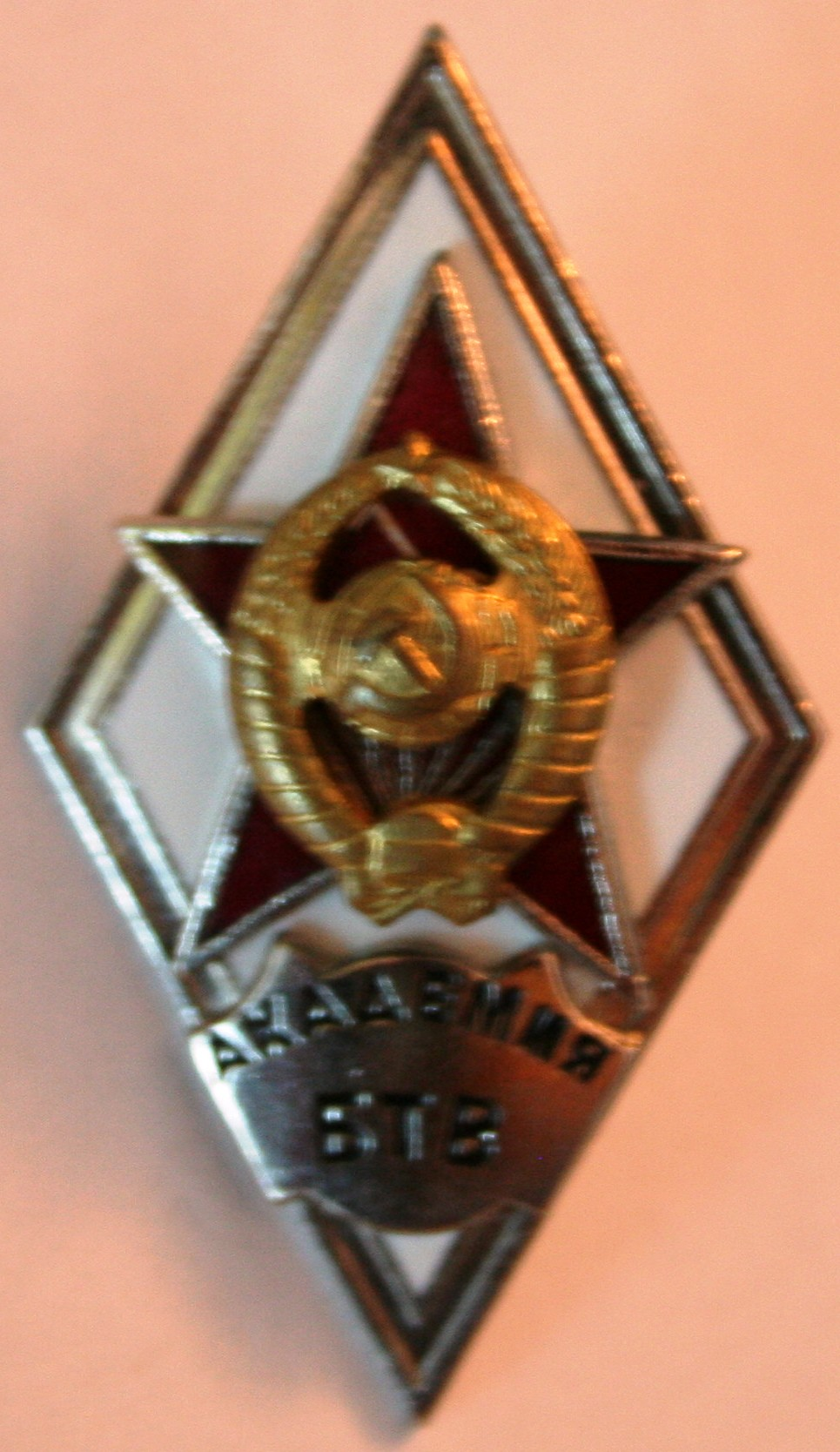 Absolwentka WABW